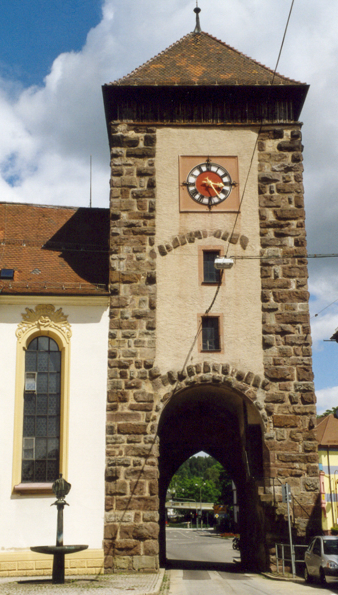 Villingen: das Bickentor (Stadtseite)